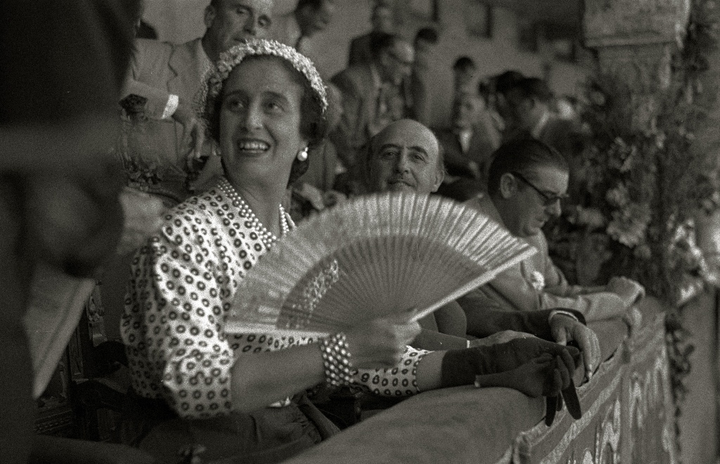 Título original: Francisco Franco y su esposa, Carmen Polo, en la plaza de toros 'El Txofre', en una corrida de la feria de abono de Semana Grande (2/5) Localización: San Sebastián (Guipúzcoa)